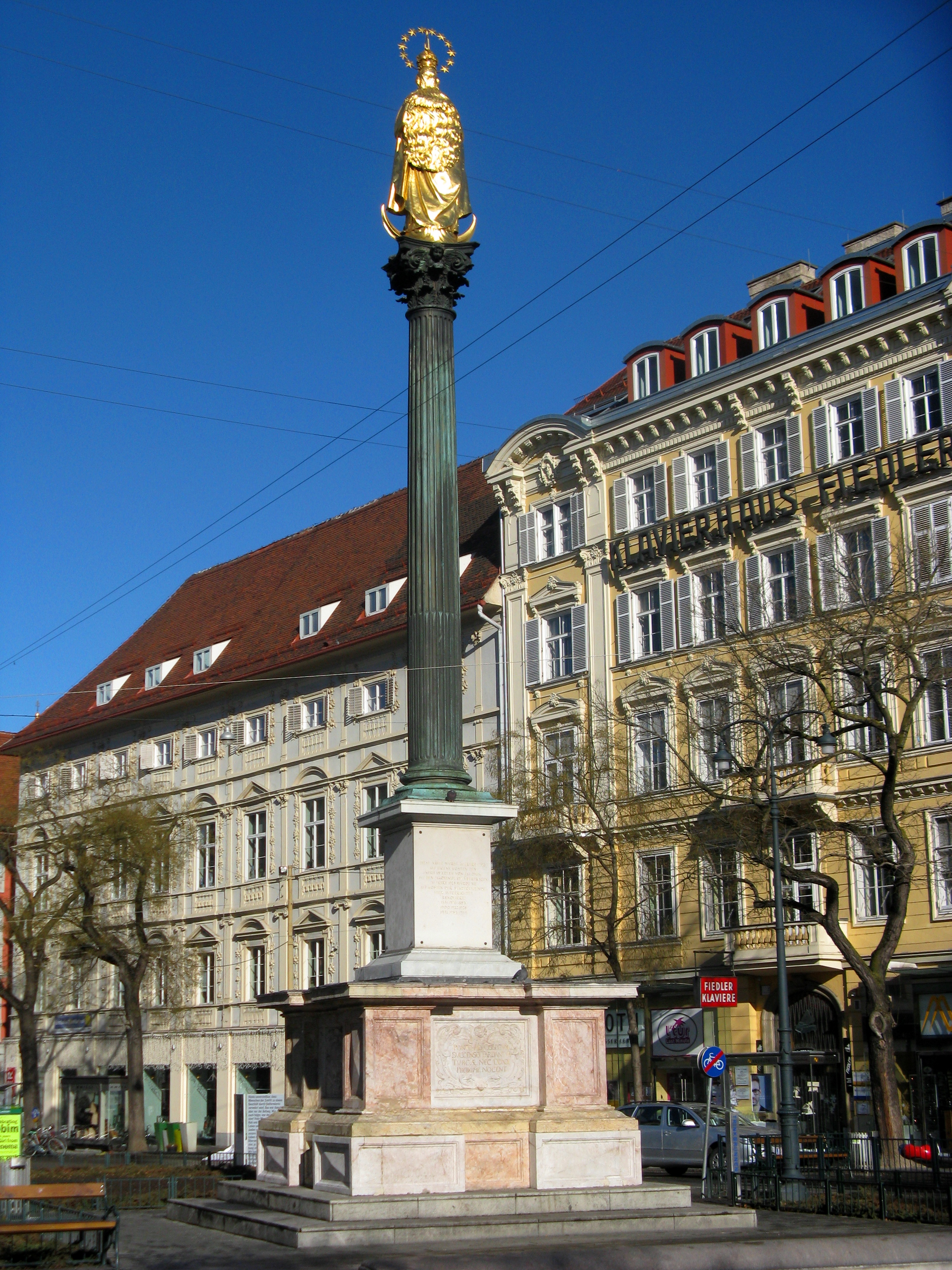 Rückseite der Mariensäule Am Eisernen Tor, Graz